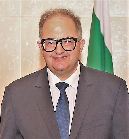 Peter Andonov, bulgarischer Botschafter in Osttimor, am Tag der Übergabe seiner Akkreditierung